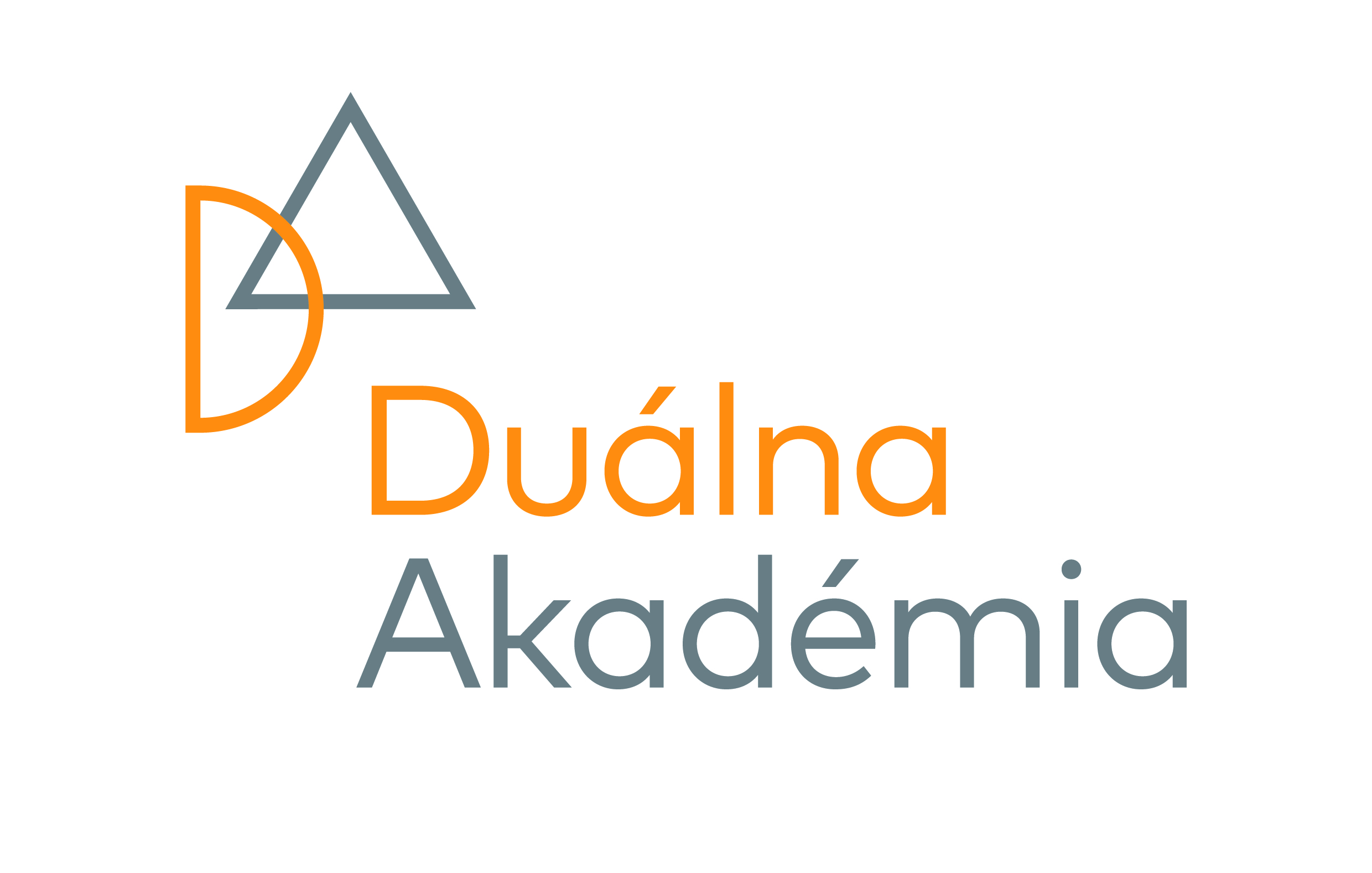 Logo Duálna Akadémia